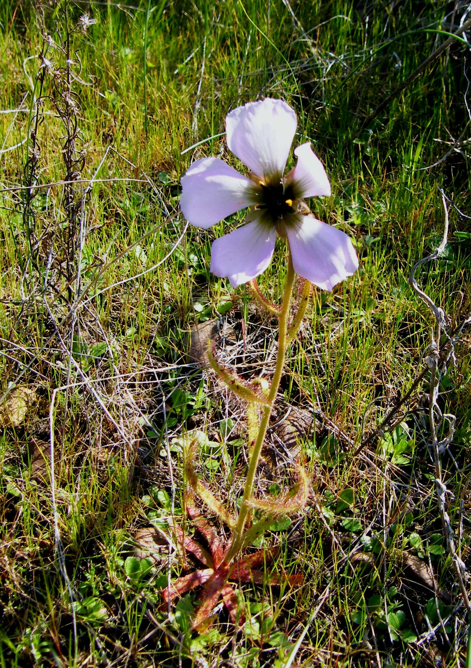 Snotrosie, Doubloom